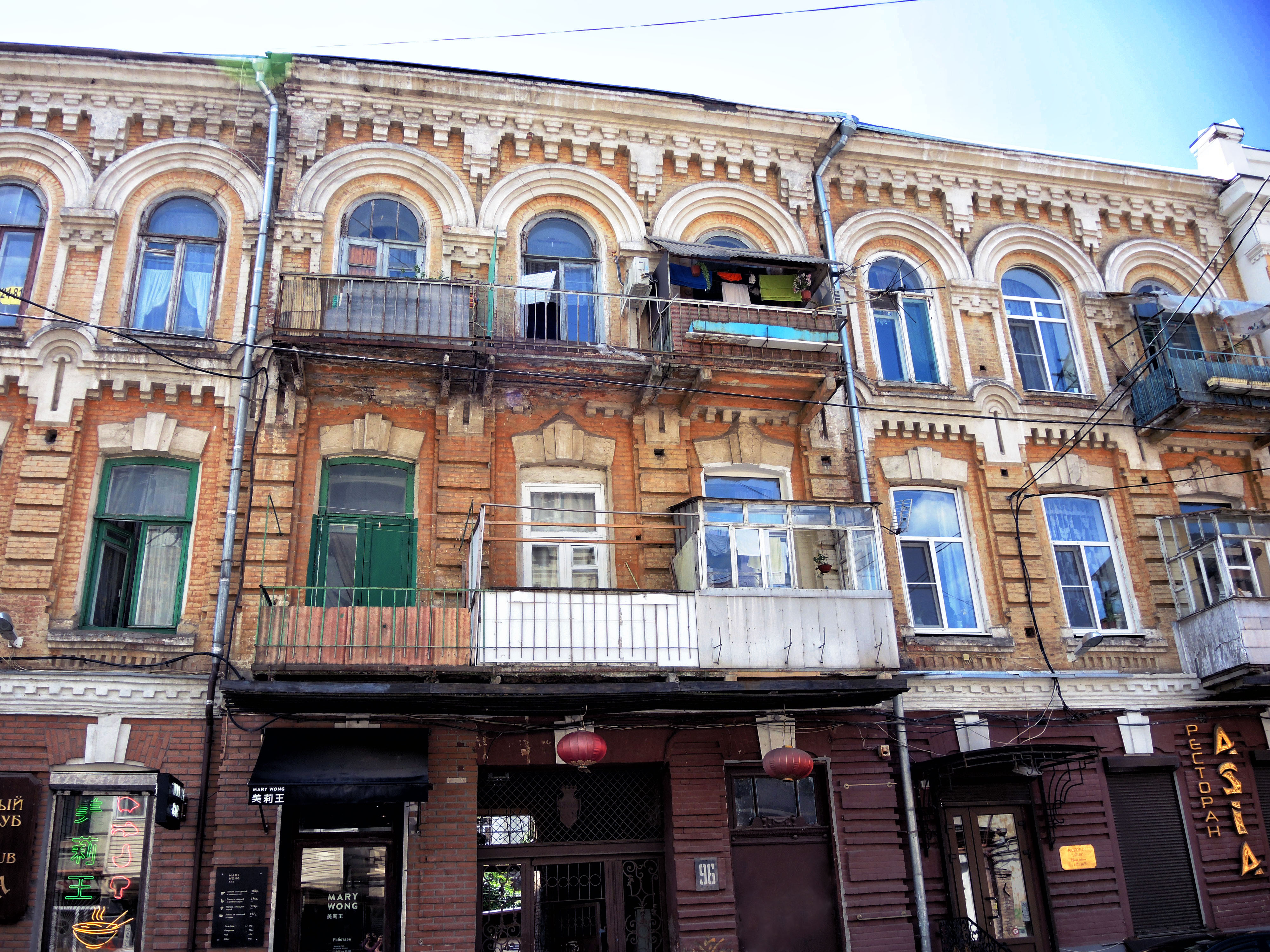 Доходный дом С. Рувинского с размещением на 1 этаже частных музыкальных курсов: улица Шаумяна, 96/101, улица Социалистическая, литер А, Ростов-на-Дону, Ростовская область